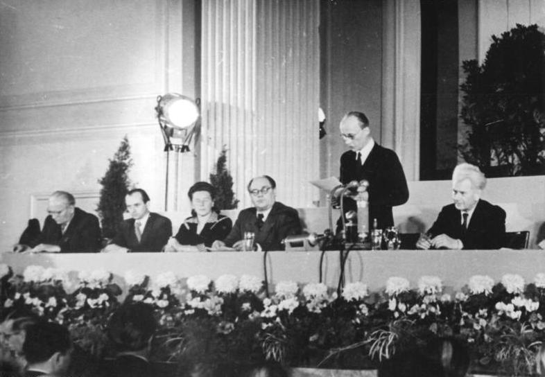 Zentralbild-Heilig Gründung der Deutschen Demokratischen Republik am 7.10.1949 Im Gebäude der DWK (Deutsche Wirtschafts-Kommission) in der Leipziger Straße in Berlin fand am 7.10.1949 die konstituerende Sitzung der Provisorischen Volkskammer statt. UBz: v.l.n.r.: Erich Geske, Herbert Hoffmann, Friedel Malter, Jonny Loehr, Johannes Dieckmann, Hermann Matern. 4130-49